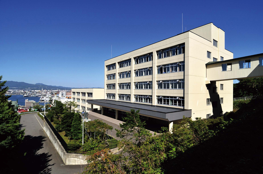 北海道函館西高級中學側拍圖，由日本維基使用者User:Weststudent於2010年上傳至日文維基百科，以CC BY-SA 3.0授權。